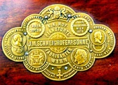 Plakette "J. M. Schweighofer's Söhne in Wien"